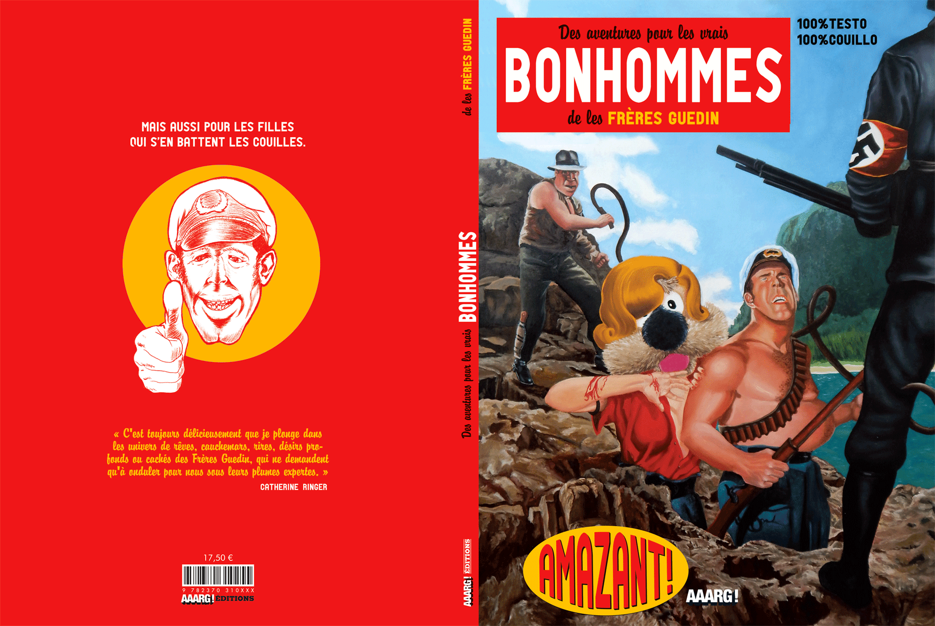 Couverture dépliée des frères Guedin. Peinture: Nadia Valentine